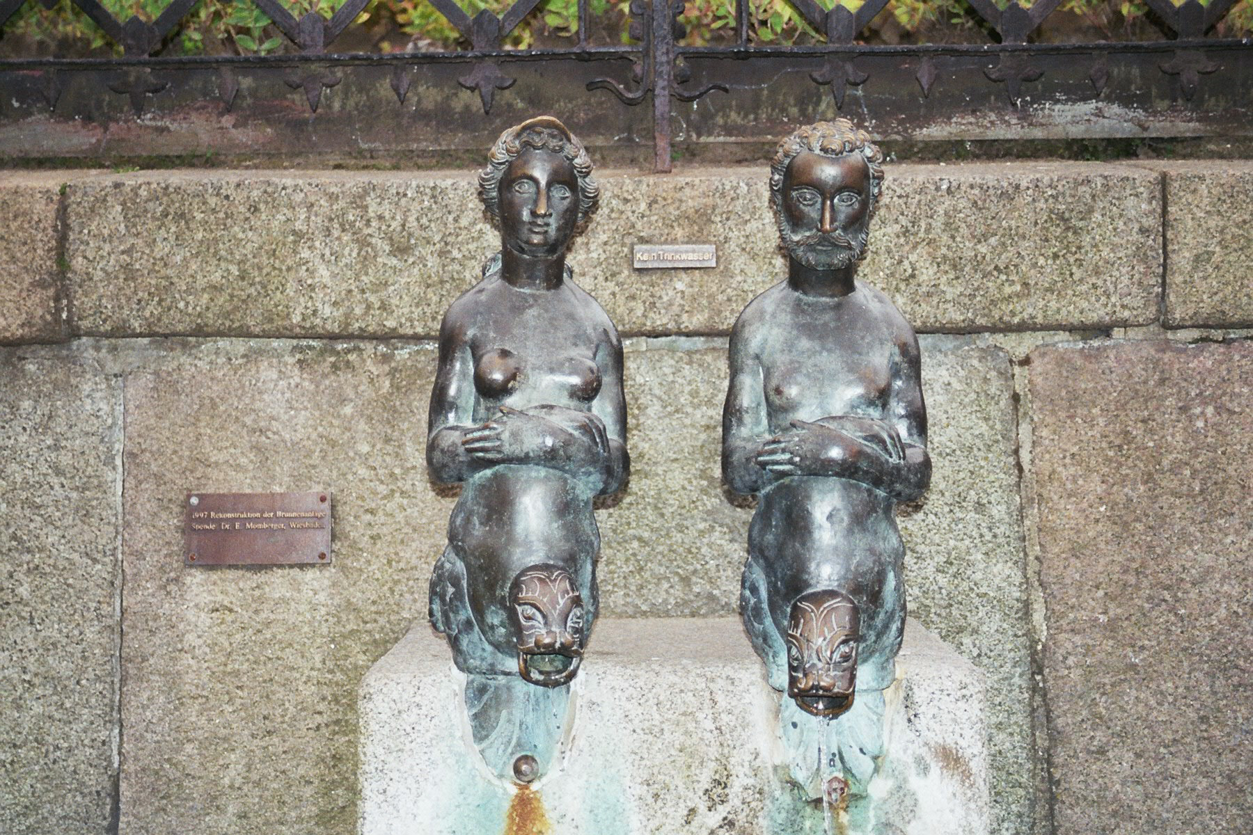 Nix und Nixe an der Wasserkunst in Wismar